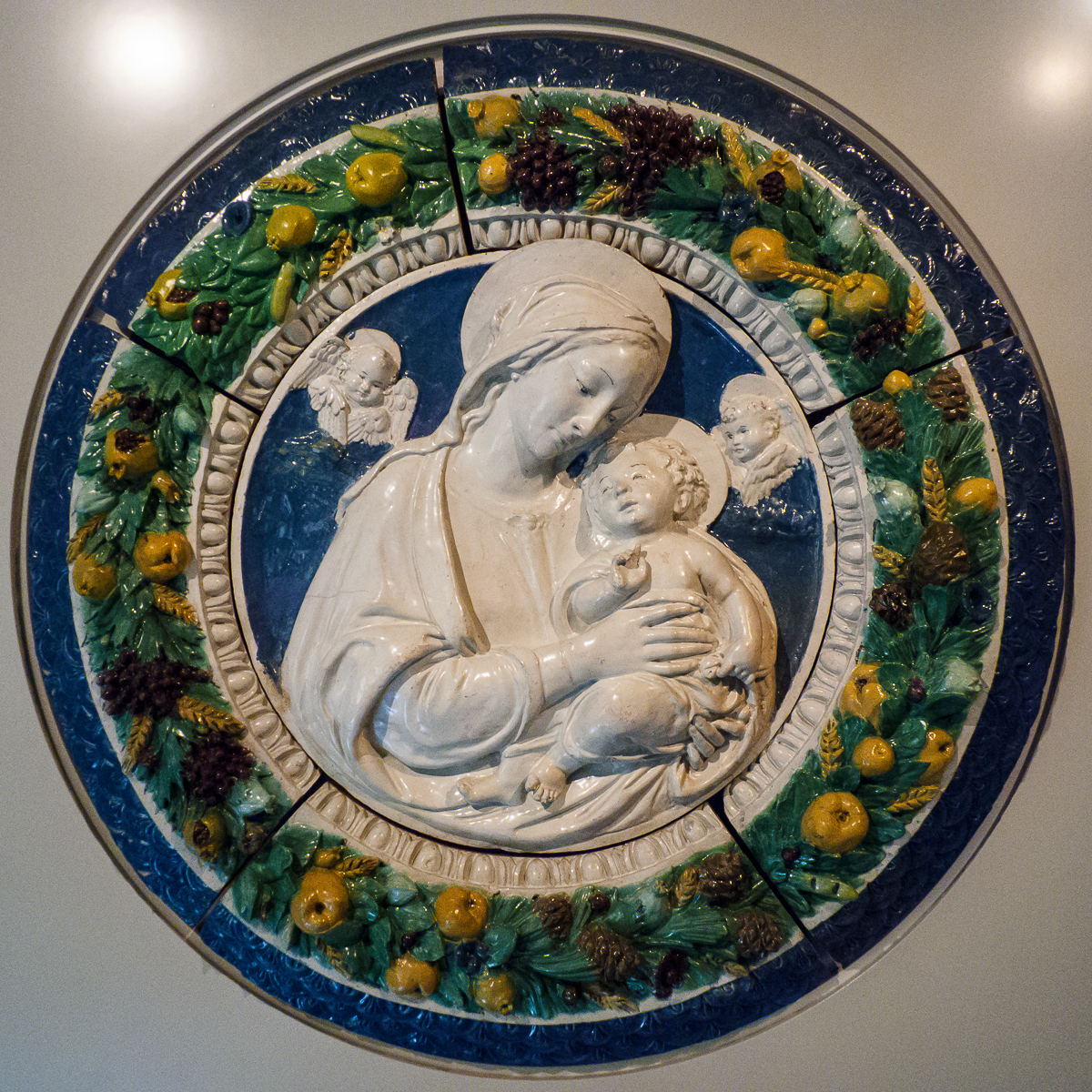 Tondo de cerámica renacentista procedente del Convento de la Trinidad de Valencia. De los talleres de Della Robbia.